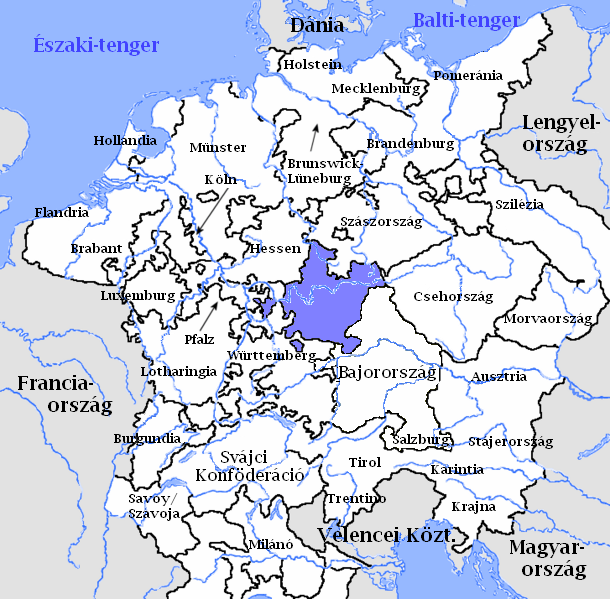 A Frankóniai körzet a Német-római Birodalomban